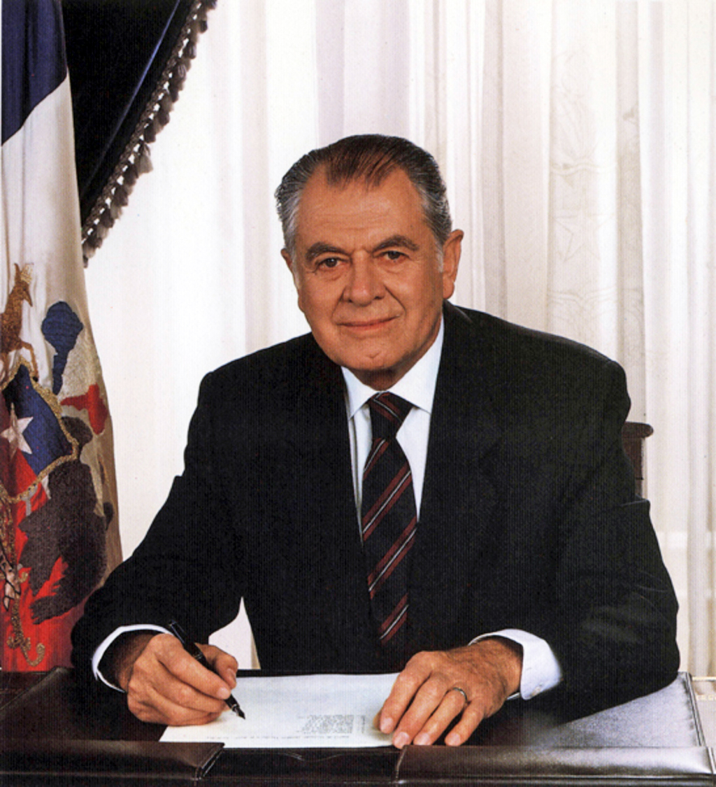 Patricio Aylwin Azócar (n. Viña del Mar, 26 de noviembre de 1918) es un político democratacristiano y jurista chileno. Fue presidente del Senado de 1971 a 1972 y primer mandatario de su país durante el periodo comprendido entre 1990 y 1994. Aylwin fue el primer presidente democráticamente electo tras el golpe de Estado del 11 de septiembre de 1973, en el que fue derrocado Salvador Allende y se instauró la dictadura de Augusto Pinochet. Así, el mandato de Aylwin dio inicio al periodo conocido como la Transición y el primero de los cuatro gobiernos consecutivos de la Concertación de Partidos por la Democracia.